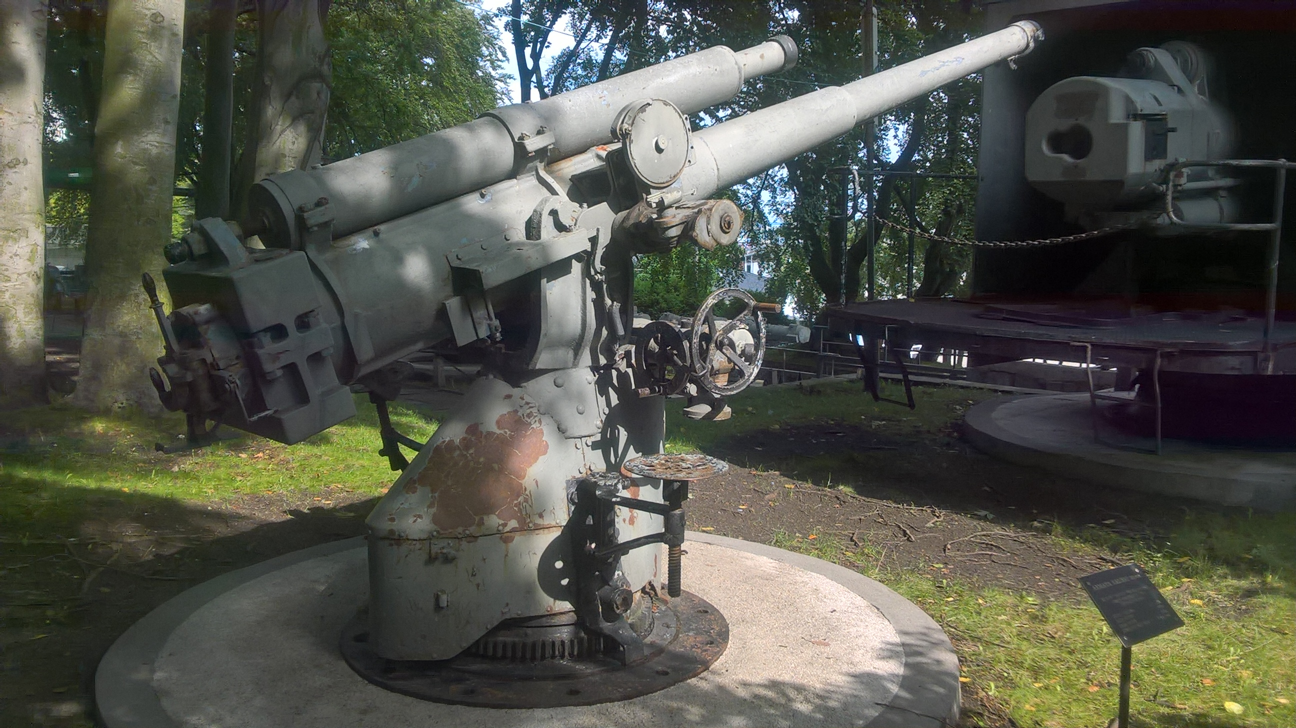 Działo morskie Schneider-Creusot M1917/24 kal. 100 mm pochodzące z okrętu podwodnego ORP "Żbik", eksponowane w Muzeum Marynarki Wojennej w Gdyni.